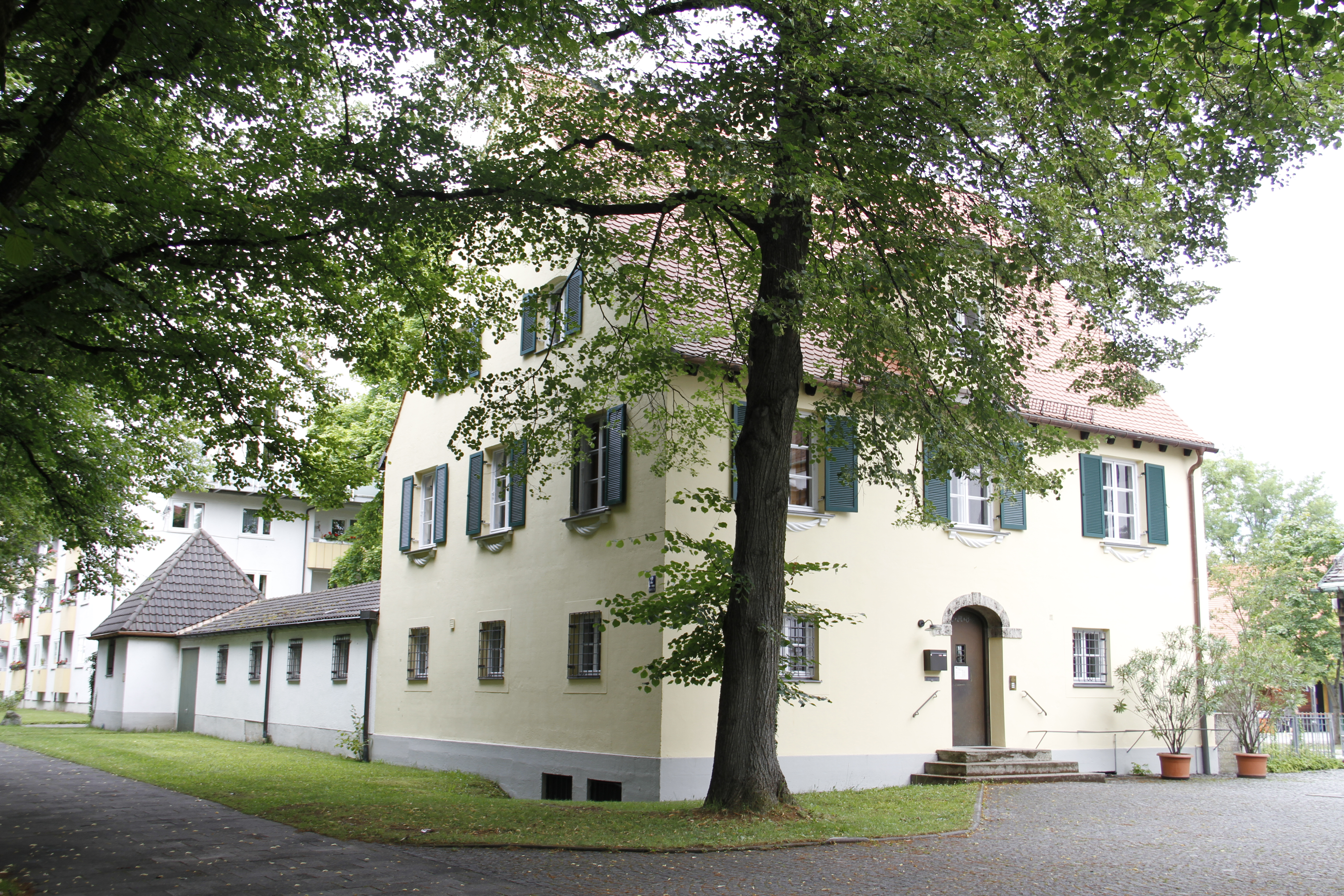 Pfarramt St. Heinrich, Scharnitz Straße 2, München. Sendling-Westpark. Ansicht von Südosten